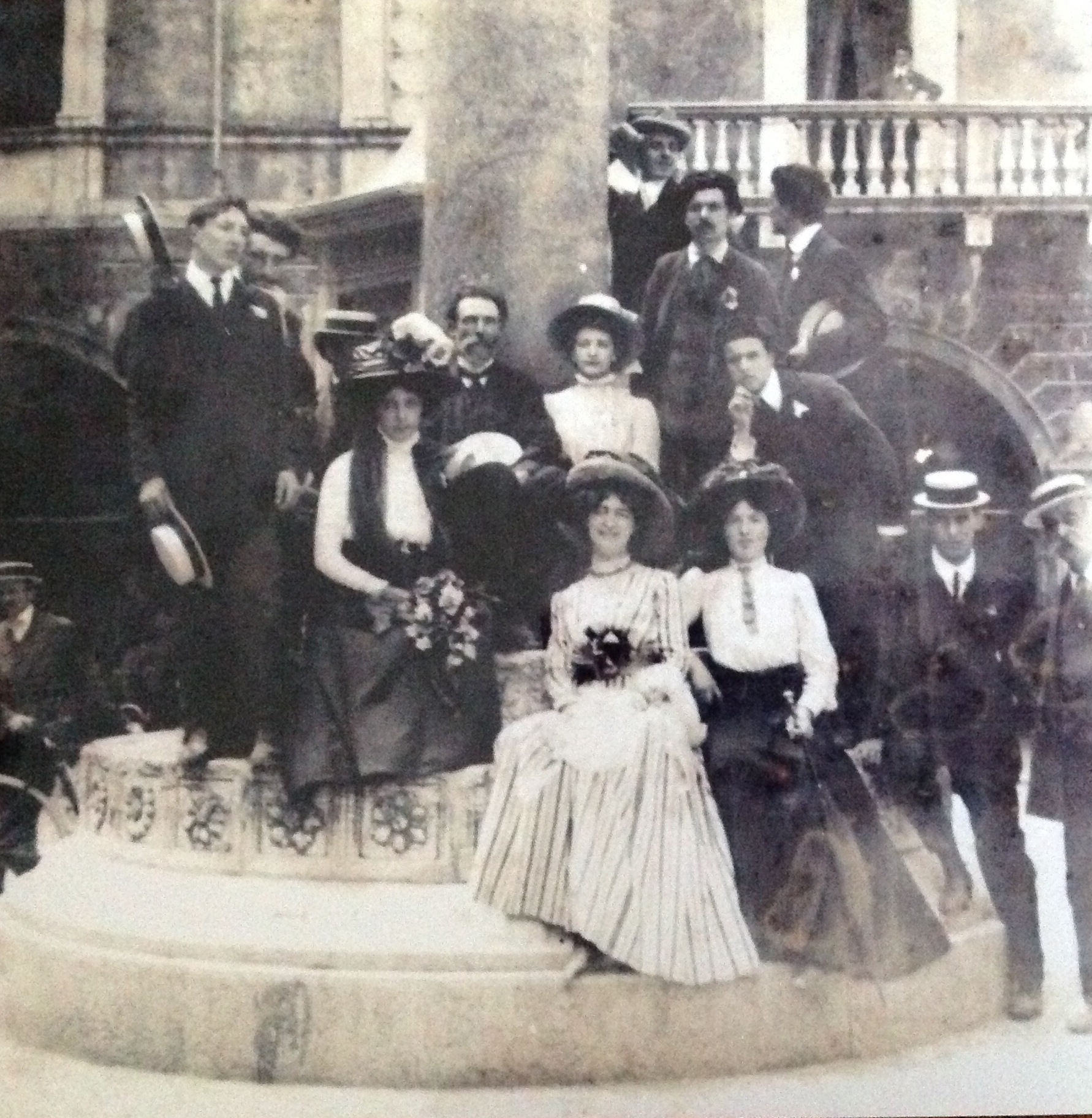 Foto dell'artista (in basso al centro) con un gruppo di amici e colleghi.